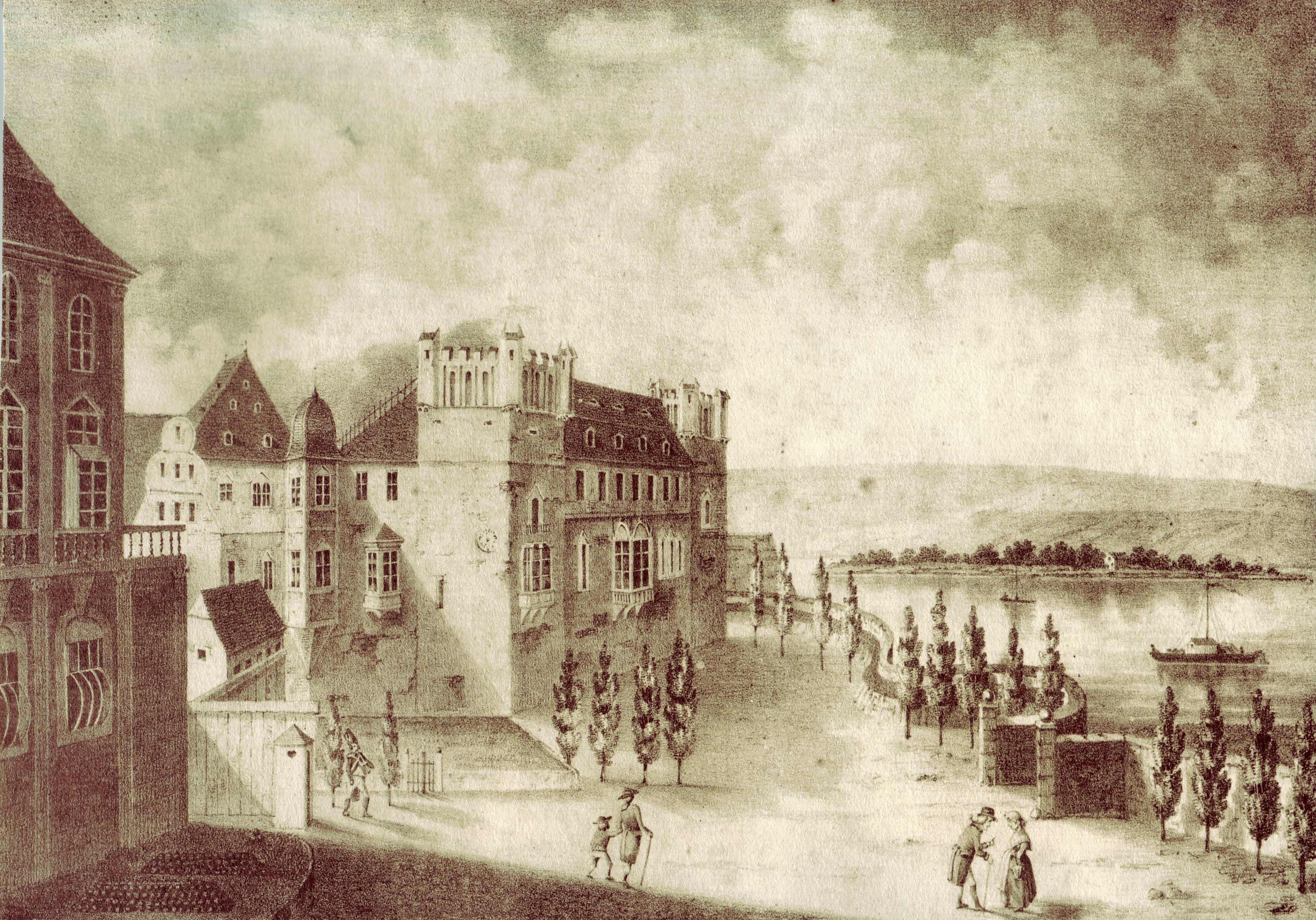 [Originalbeschreibung] Die Martinsburg erhielt ihren Namen durch Kurfürst Diether von Isenburg nach dem mainzer Stiftspatron Martinus. Sie stand unmittelbar vor dem alten Schlossbau im jetzigen Freihafen. Kurfürst Diether erbaute sie im Jahre 1478 gröstentheils aus Holz als seine Residenz. Da sie aber im Jahre 1481 abbrannte, liess er dieselbe aus Quatersteinen erbauen und gab ihr die Festigkeit einer Ritterburg, aus Furcht vor einem Übnerfall der mainzer Bürger wegen seines unrechtlichen Verfahren. Kurfürst von Erthal liess sei im Jahre 1774 mit dem alten Schlossbau durch einen Gang verbinden und wählte sie als den schönsten Theil des kurfürstlichen Schlosses zu seiner Wohnung. Im Jahre 1807 wurde sie niedergerissen und ihre Steine wurden zum Quai des Freihafen verwendet.